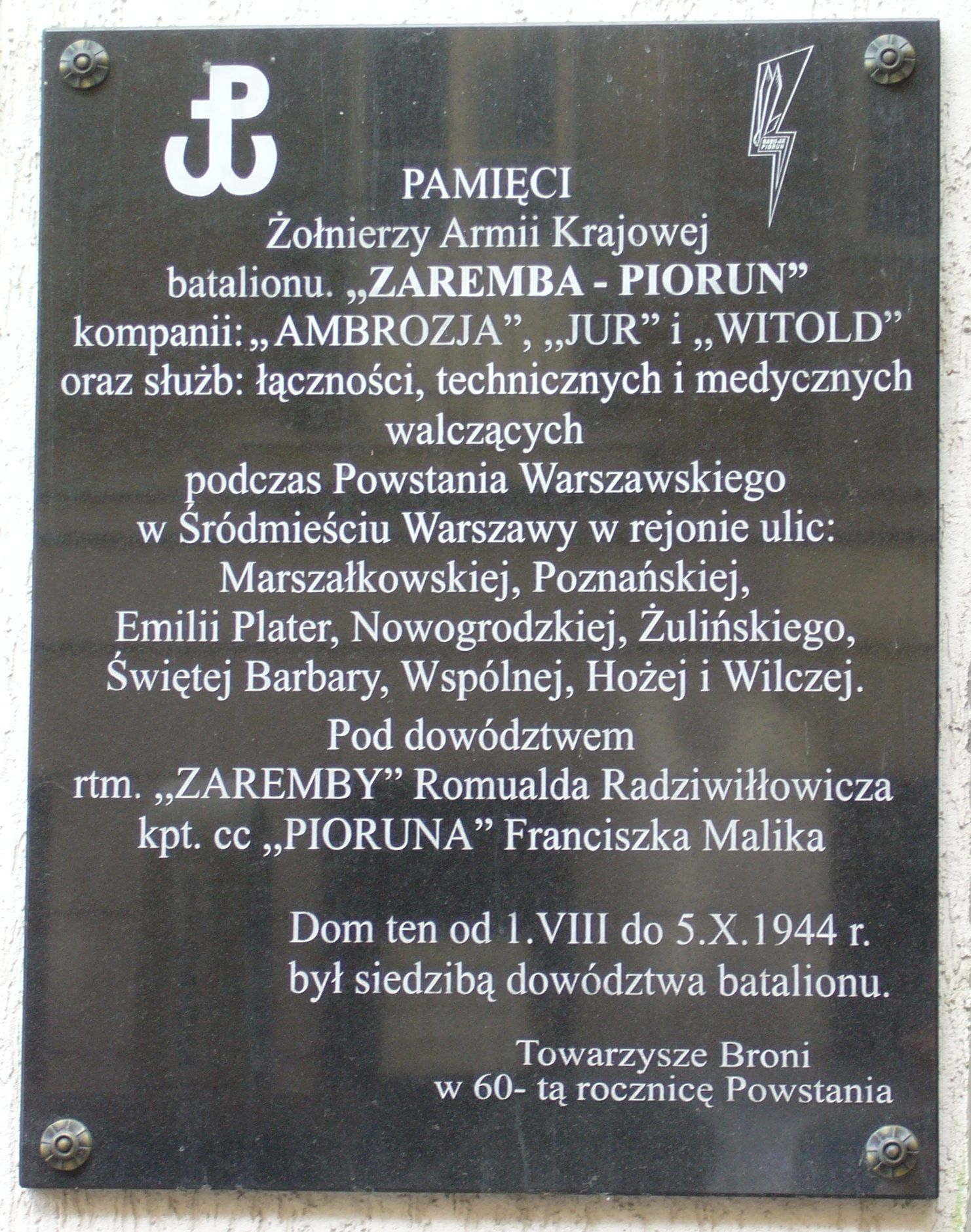 Tablica upamiętniająca walkę batalionu "Zaremba-Piorun"